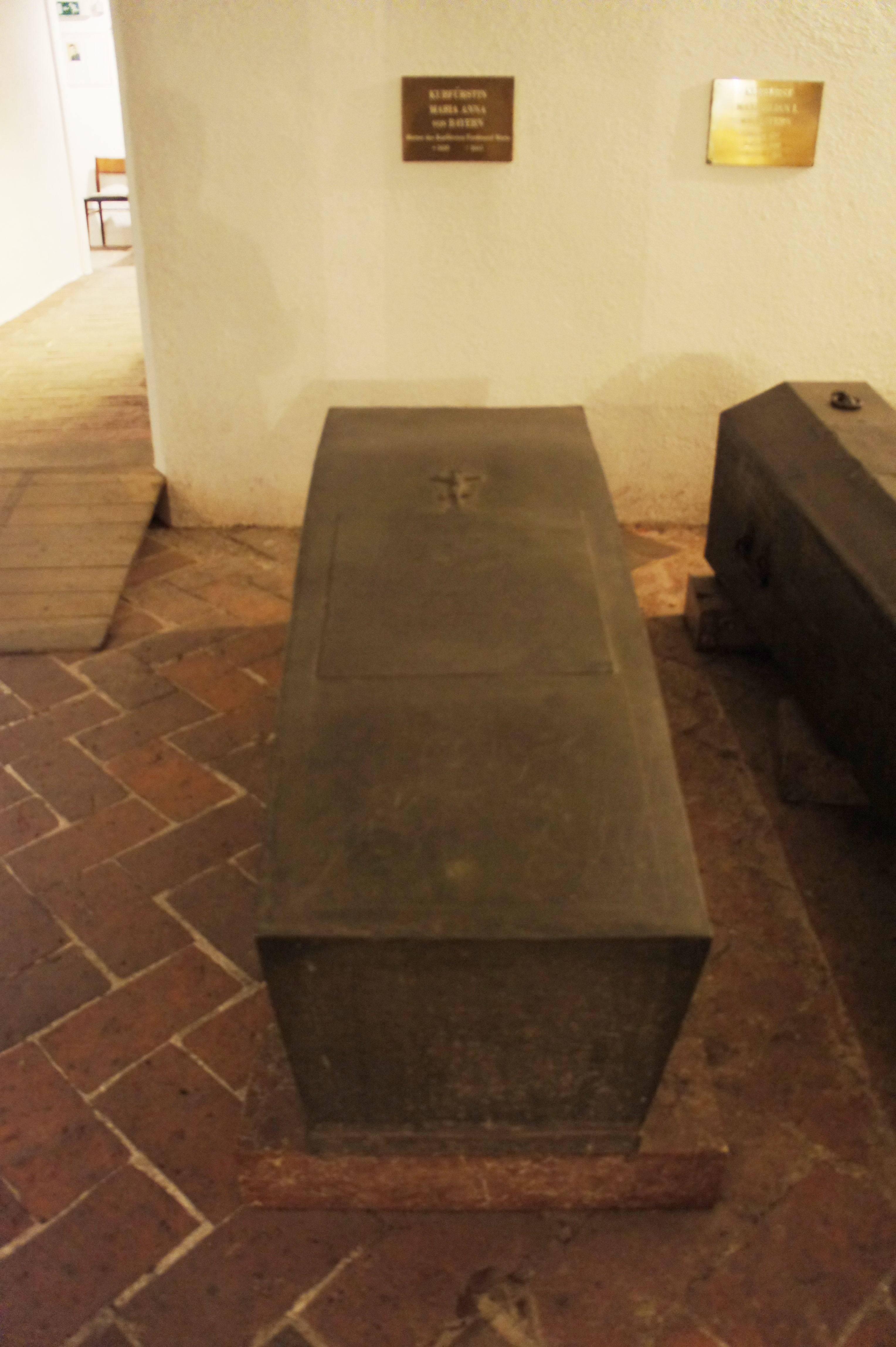 Maria Anna von Österreich, Kurfürstin von Bayern (13. Januar 1610 – 25. September 1665) (zweite Gemahlin von Kurfürst Maximilian I.). Sarkophag in der Grablege der Wittelsbacher in der St. Michael Kirche in München.